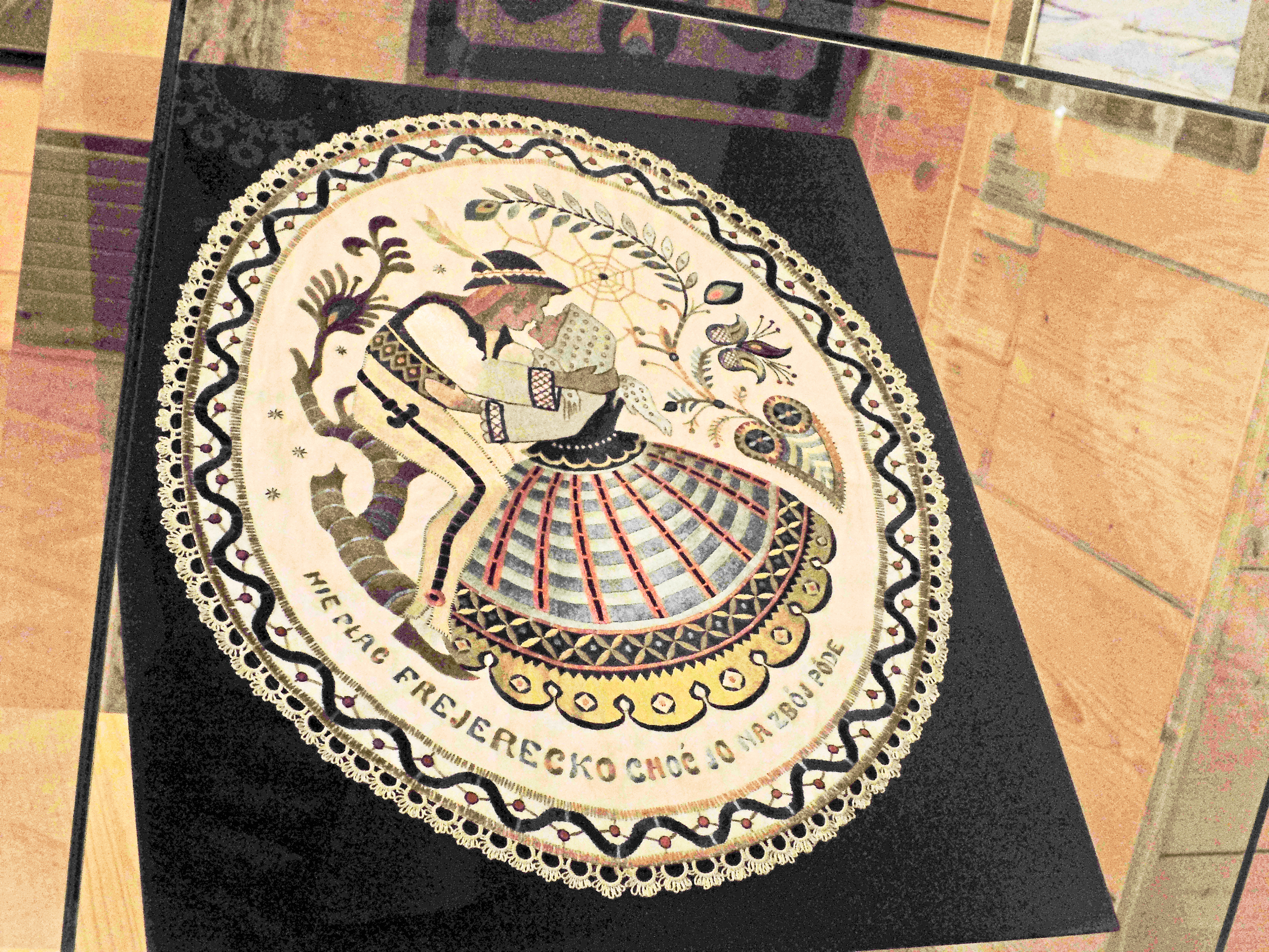 Inetrior and items from a collection of Tatra Museum in Zakopane Serweta, wykonana przez uczennice szkoły koronkarskiej według projektu Karola Kłosowskiego, 1925